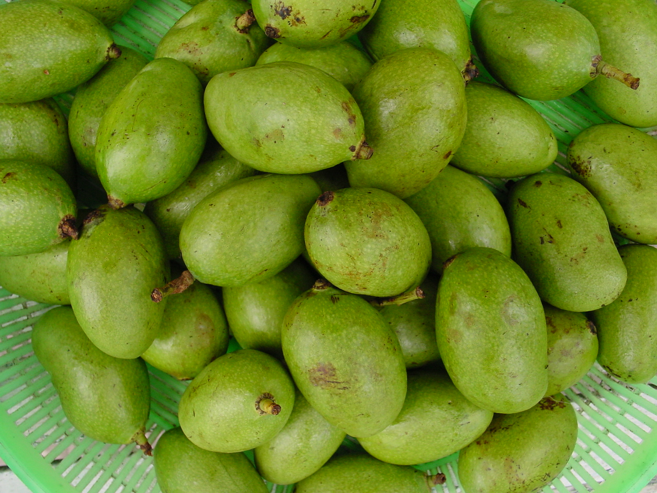 native Philippine green mango